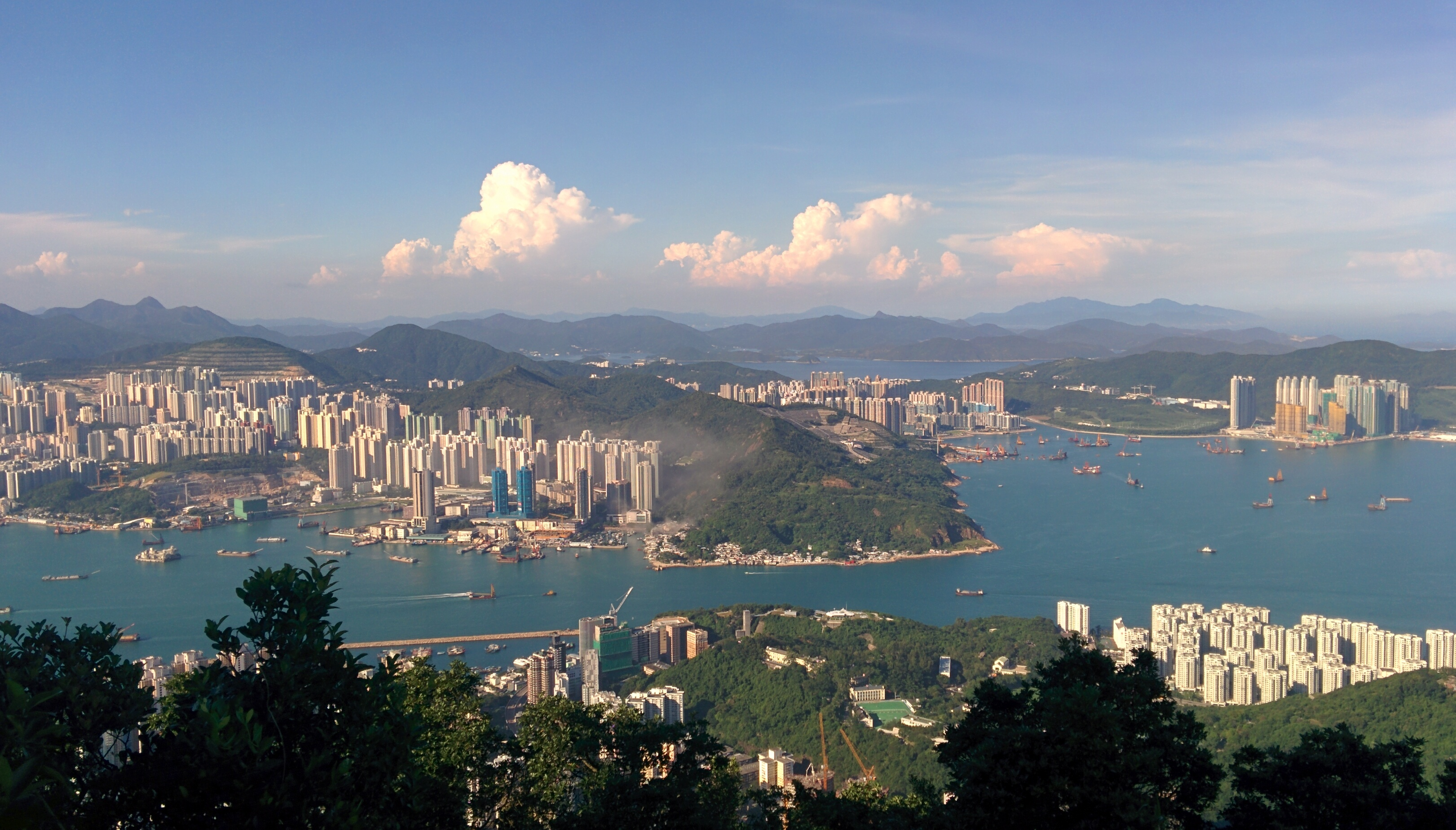 粵語: 從柏架山山頂可看見鯉魚門，魔鬼山，